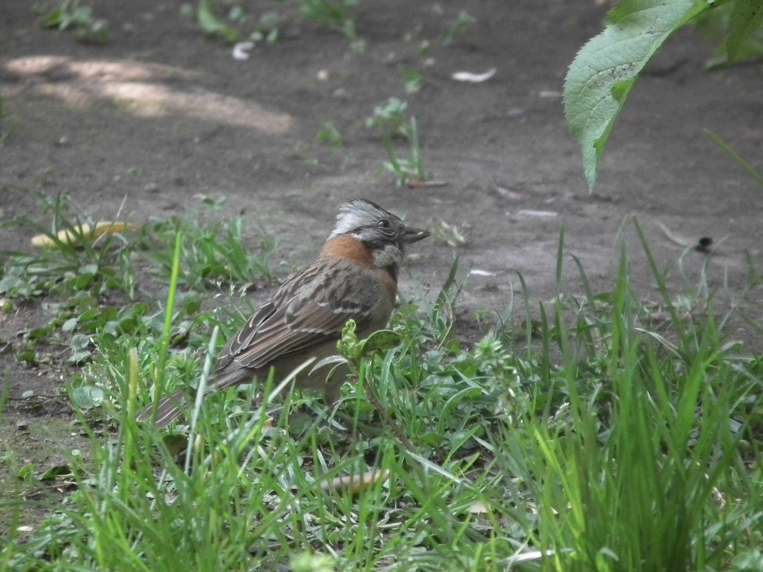 El chingolo, chincol, cachilo, copetón, pichitanca, comemaíz o chesy hasy ( Zonotrichia capensis') es un ave neotropical, la única de esta distribución entre los mal llamados gorriones americanos del género Zonotrichia. Es similar a la especie alóctona del gorrión doméstico (Passer domesticus), distinguiéndose por poseer un copete con rayas negras y una figura menos rotunda.